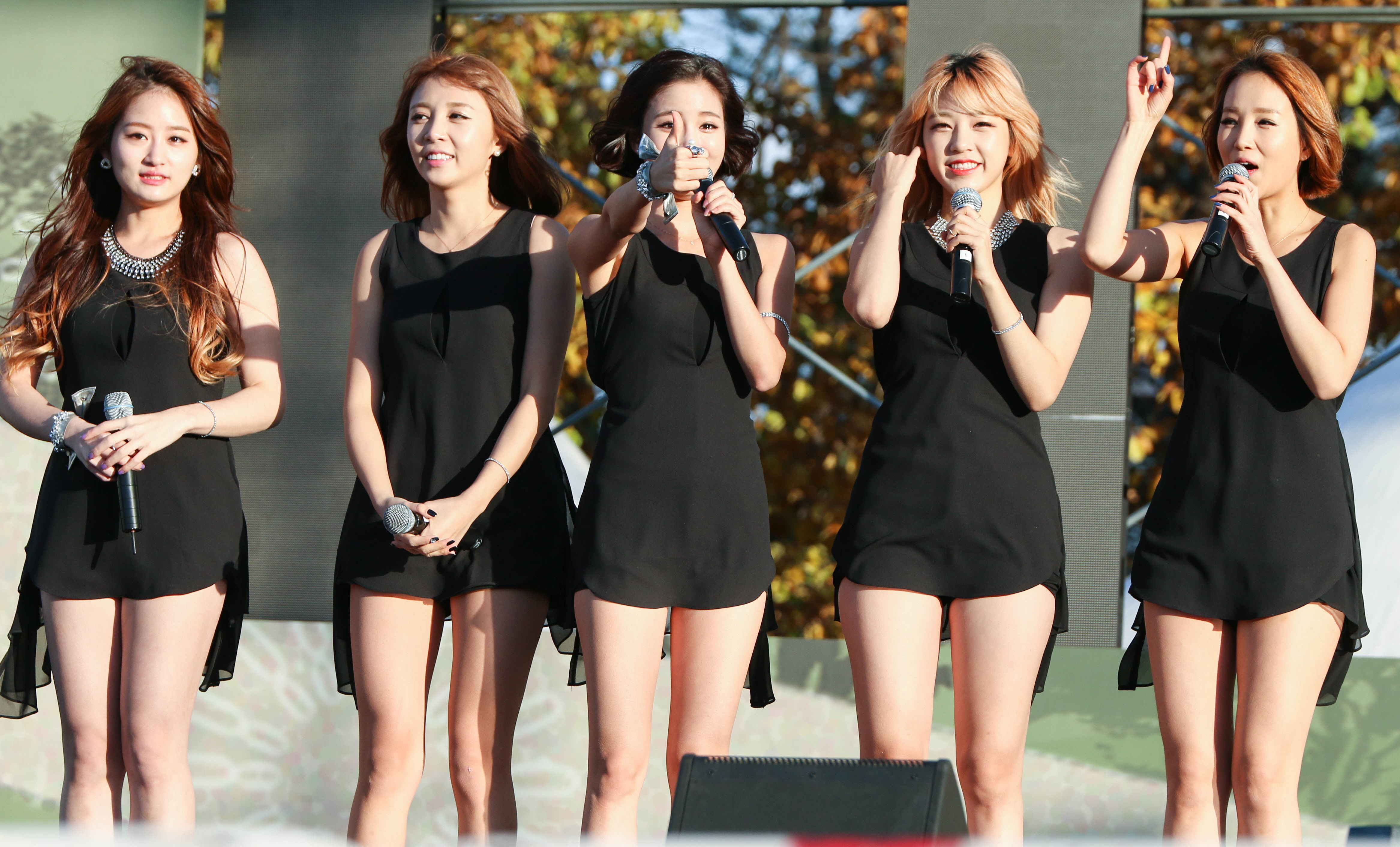 141102 타히티 연천 전곡리 구석기축제